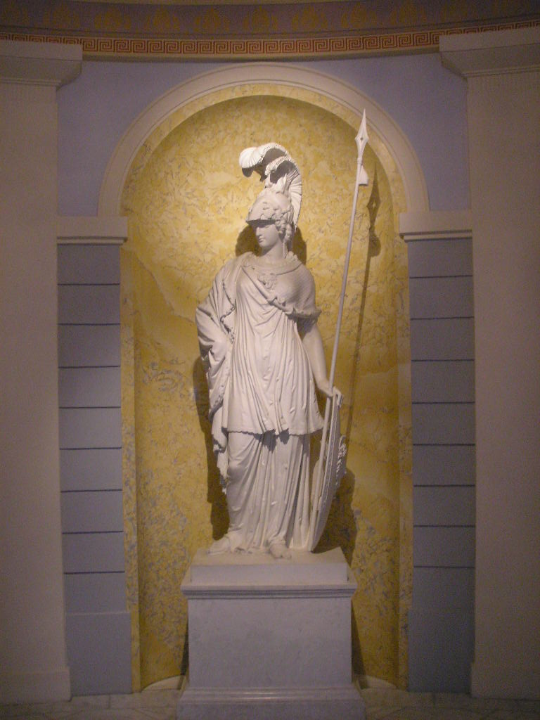 The Albertina, former Palais Erzherzog Albrecht, in Vienna. Statue Minerva by Josef Klieber.